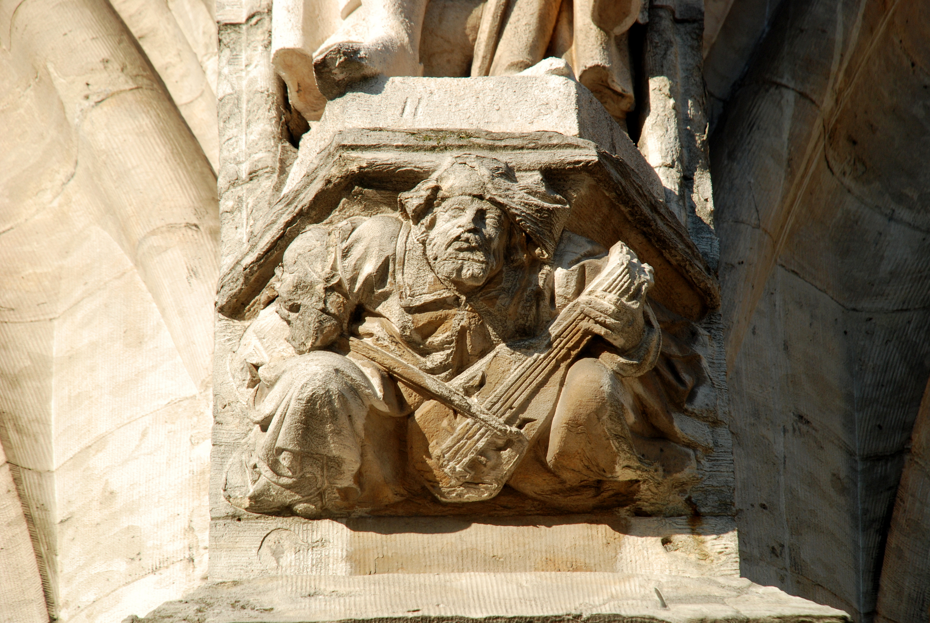 Belgique - Bruxelles - Hôtel de ville de Bruxelles